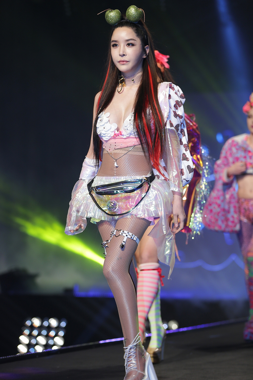 2018 LBMA STAR 라바우먼 패션쇼